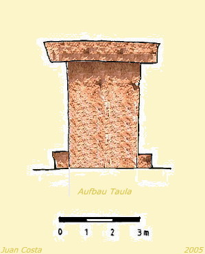 Skizze zeigt die Bauform der Taula